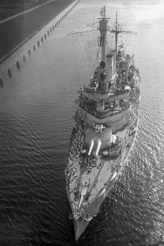 Zur grossen deutschen Flottenschau in Swinemünde! Eine imposante Aufnahme auf das Deck des deutschen Linienschiffes "Schleswig-Holstein" während seiner Durchfahrt durch den Kaiser-Wilhelm-Kanal von der Holtenauer Brücke aus gesehen.